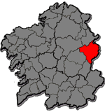 Mapa coa localización da Comarca dos Ancares.